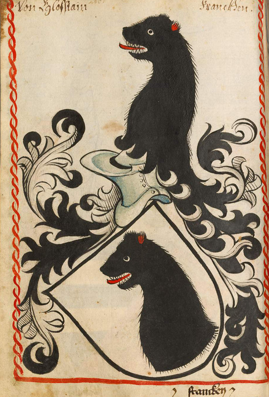 Scheibler'sches Wappenbuch , älterer Teil Egloffstein